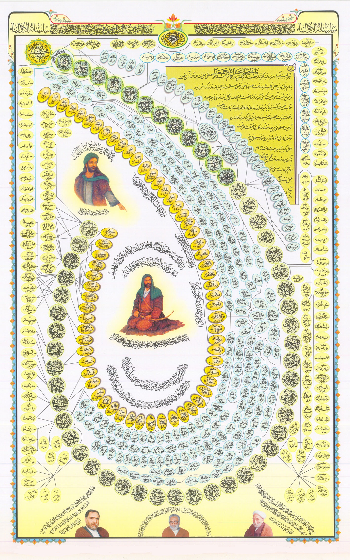 کرسی نامه (سلسله اولیا)